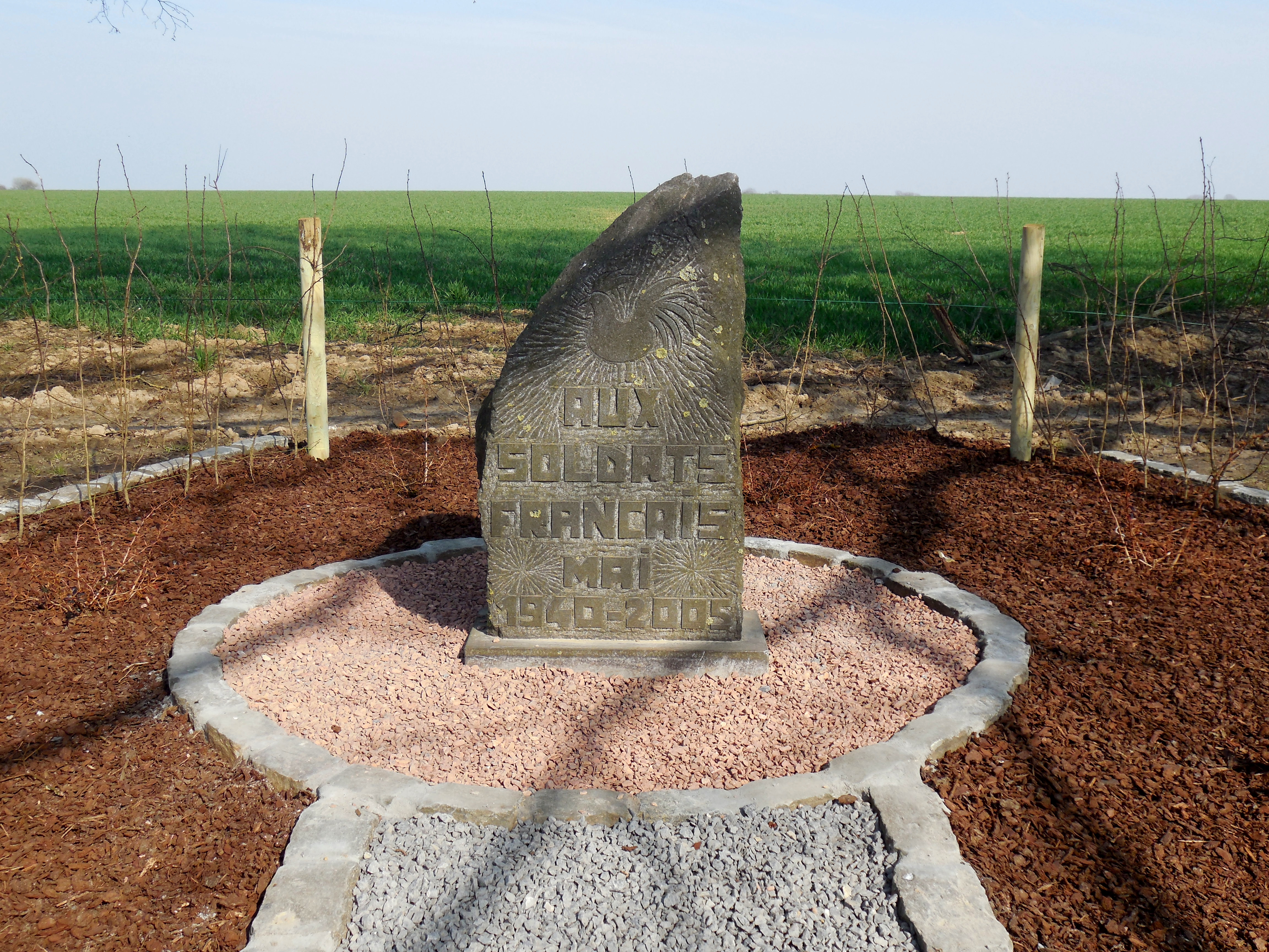 Belgique - Brabant wallon - Court-Saint-Étienne - Arbre de la justice